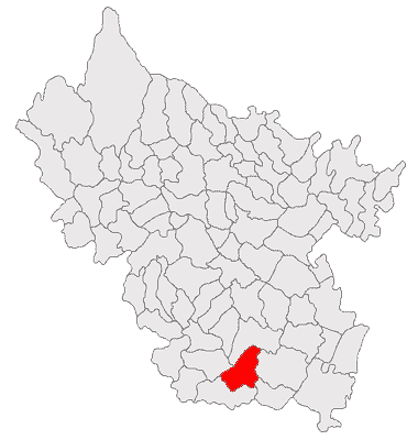 Categorie:Hărţi ale judeţului Buzău